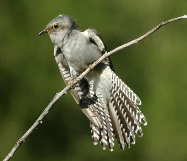 Pallid Cuckoo (Cuculus pallidus) Kobble Creek SE Queensland